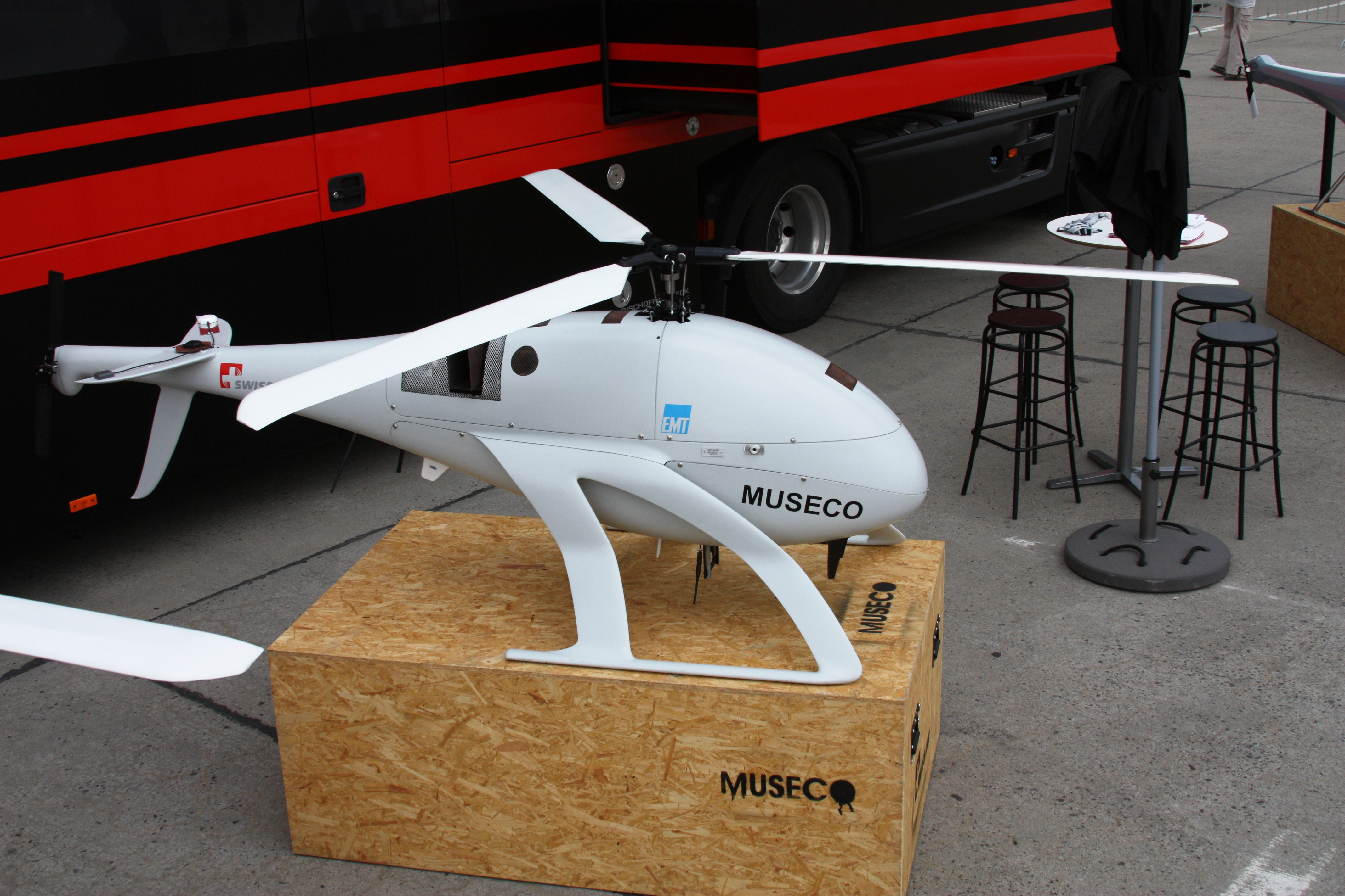 ILA 2010, am Samstag aufgenommen, meist erhöht von einer Leiter fotografiert